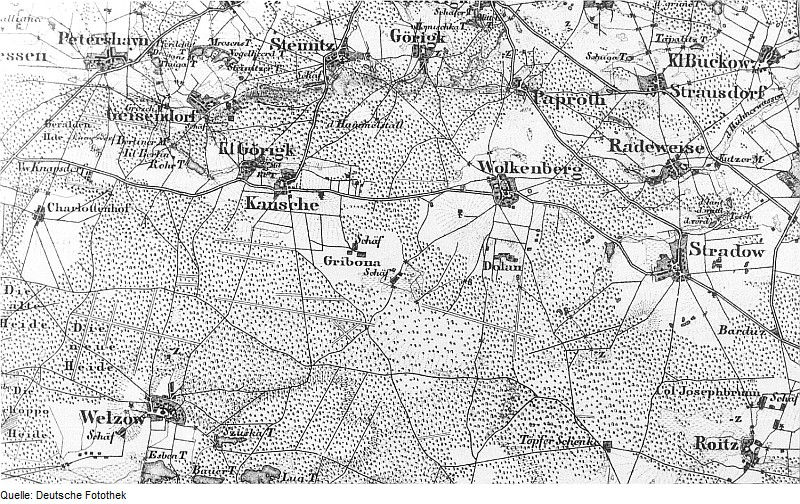 Original image description from the Deutsche Fotothek Wolkenberg. Topographische Karte vom Preußischen Staate, Blatt 233 Alt Döbern, grav. 1850